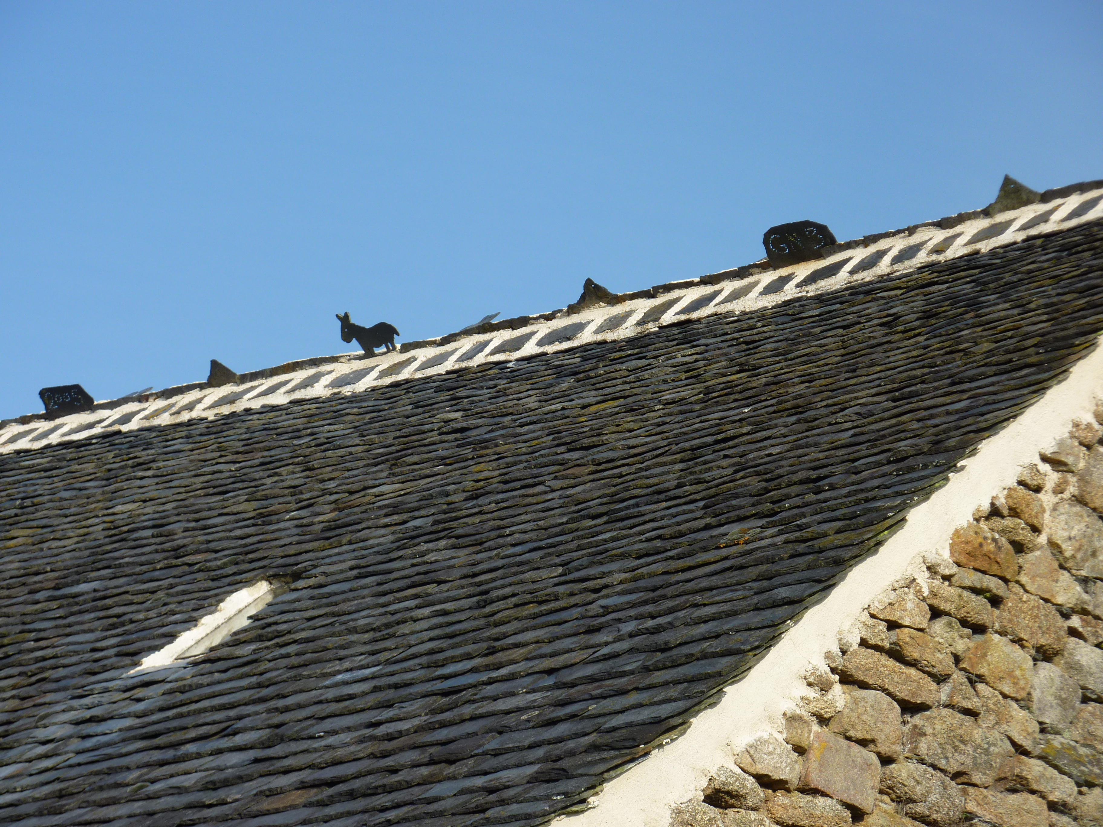 Détail d'un lignolet de toit au Creisquer en Botmeur